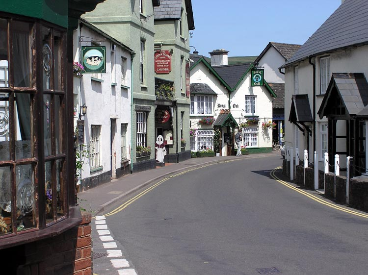 Porlock village, Somerset